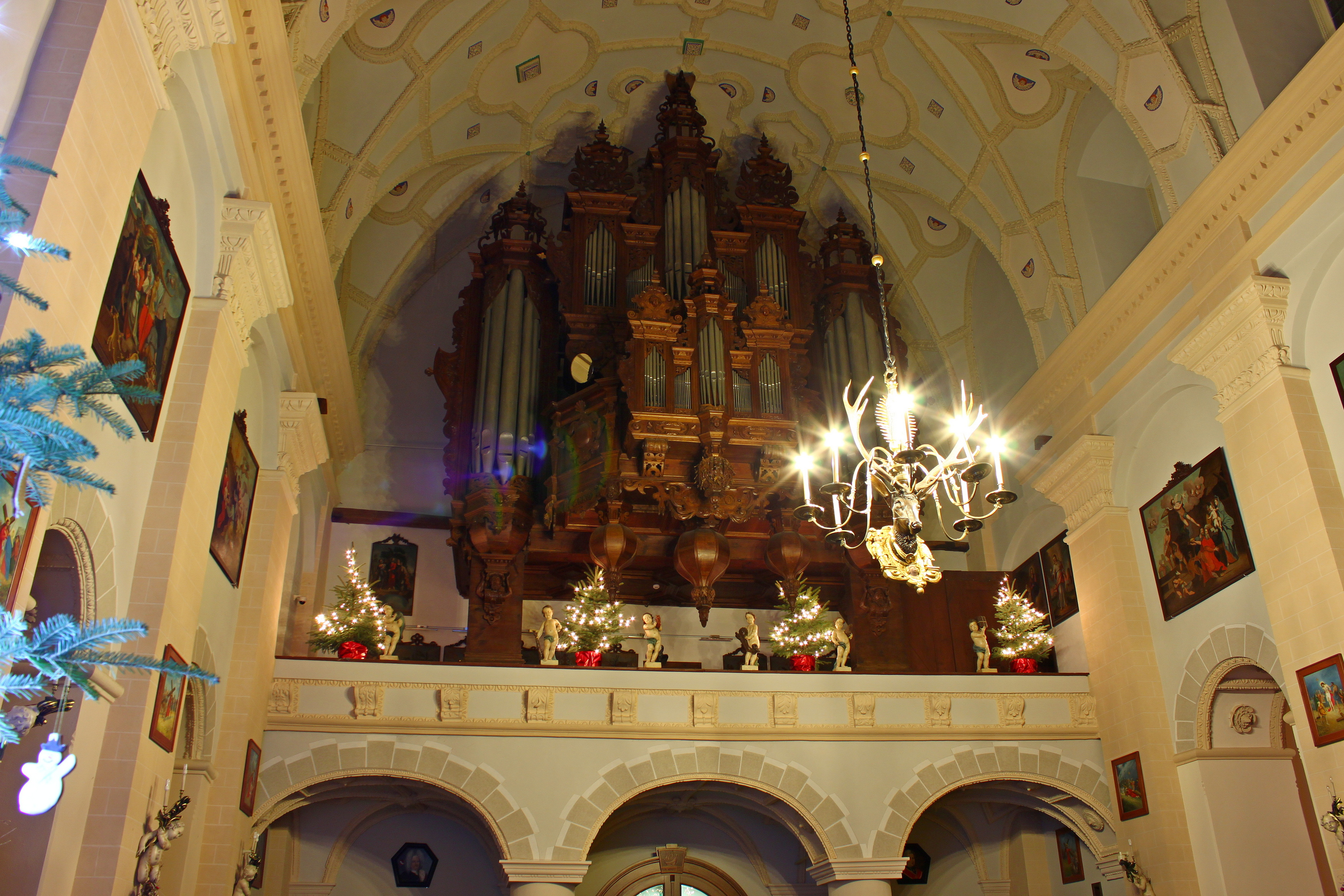 Kazimierz Dolny, kościół par. p.w. śś. Jana Chrzciciela i Bartłomieja, XV, XVII